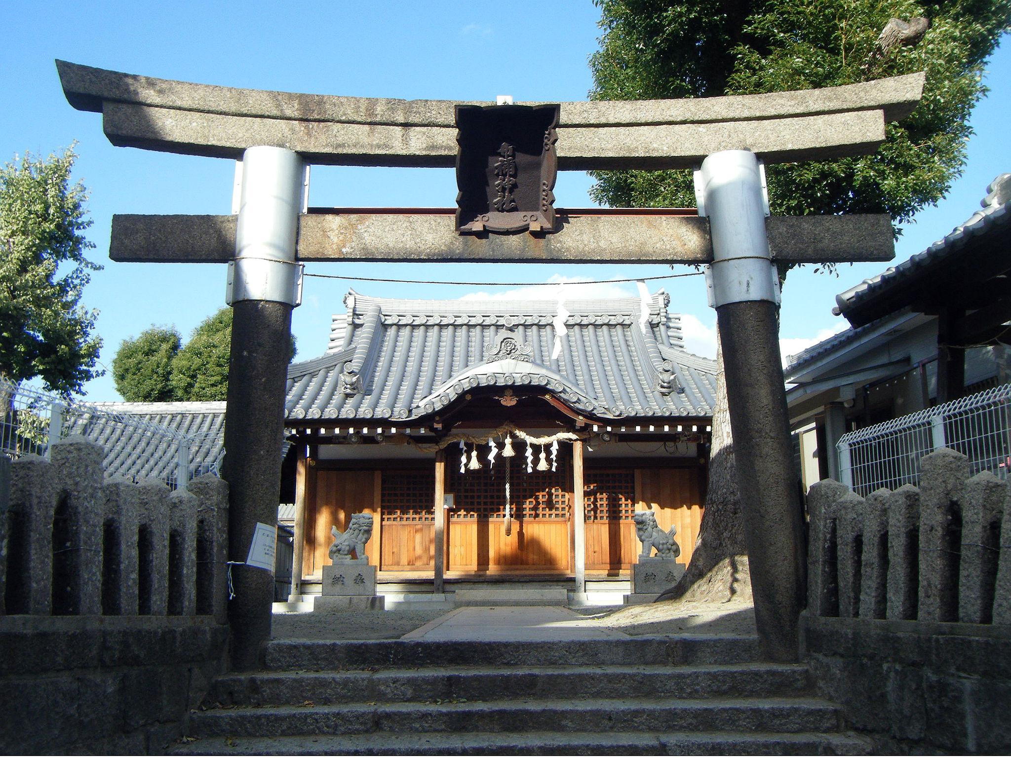 長洲貴布禰神社・入口